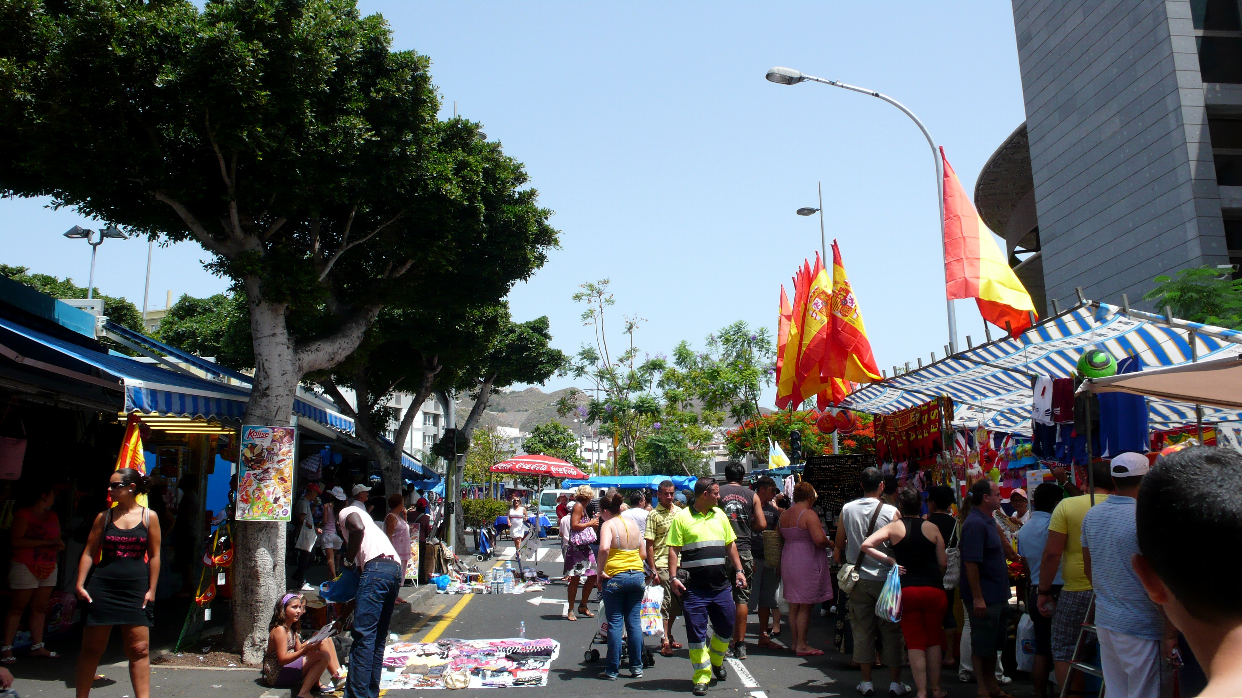 Rastro de Santa Cruz de Tenerife